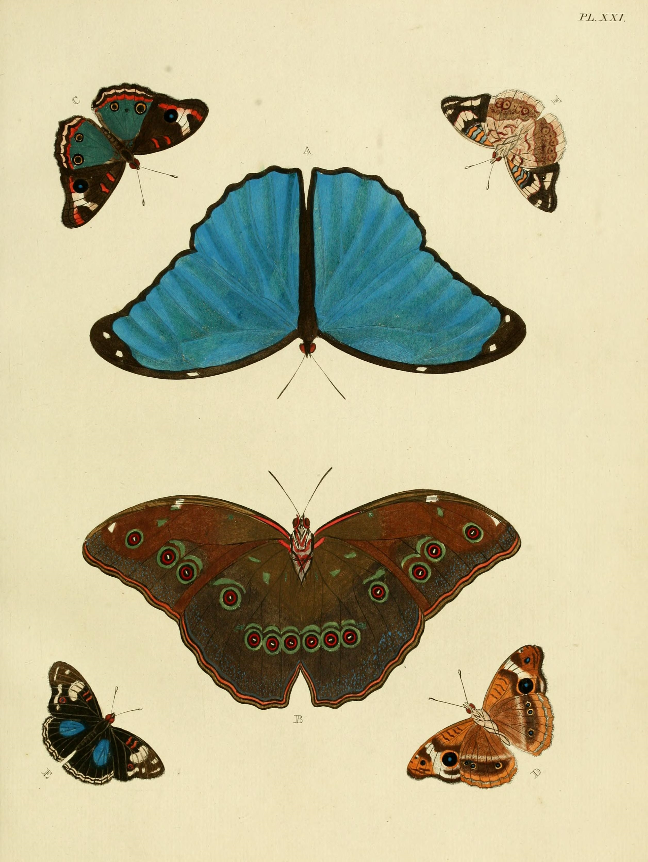 Plate XXI A, B: "(Papilio) menelaus" ( = Morpho menelaus), see Funet C, D: "(Papilio) Lavinia" ( = Junonia evarete evarete), see Funet. Also on plate 203 C, D as "(Papilio) Evarete". Iconotype? E, F: "(Papilio) Clelia" ( = Junonia oenone, see Funet